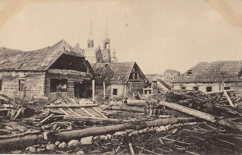 Беларуская (тарашкевіца): Відзы (Vidzy), рог пляцу Рынку (plac Rynak) і вуліцы Татарскай (vulica Tatarskaja)